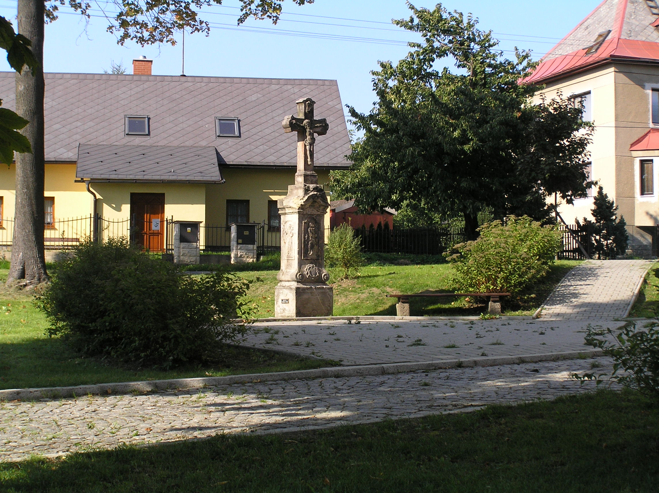 Kříž, před kostelem, Rádlo (okres Jablonec nad Nisou).